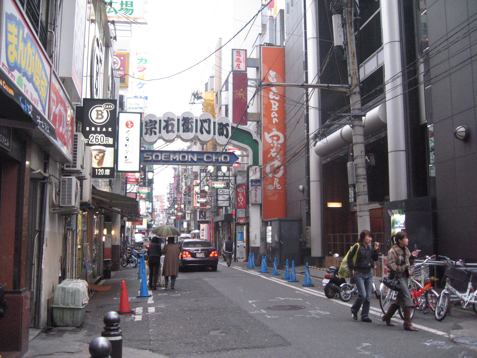 Soemon-Cho, Shinsaibashi, Osaka, Kansai Region.